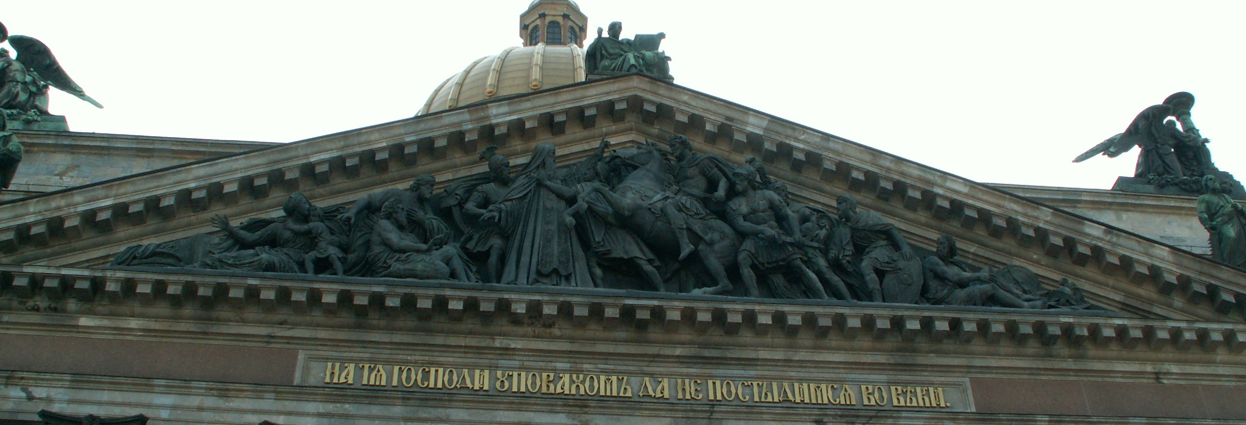 East front of Saint Isaac's cathedral. Saint Petersburg, Russia Восточный фронтон Исаакиевского собора. Санкт-Петербург. Россия.